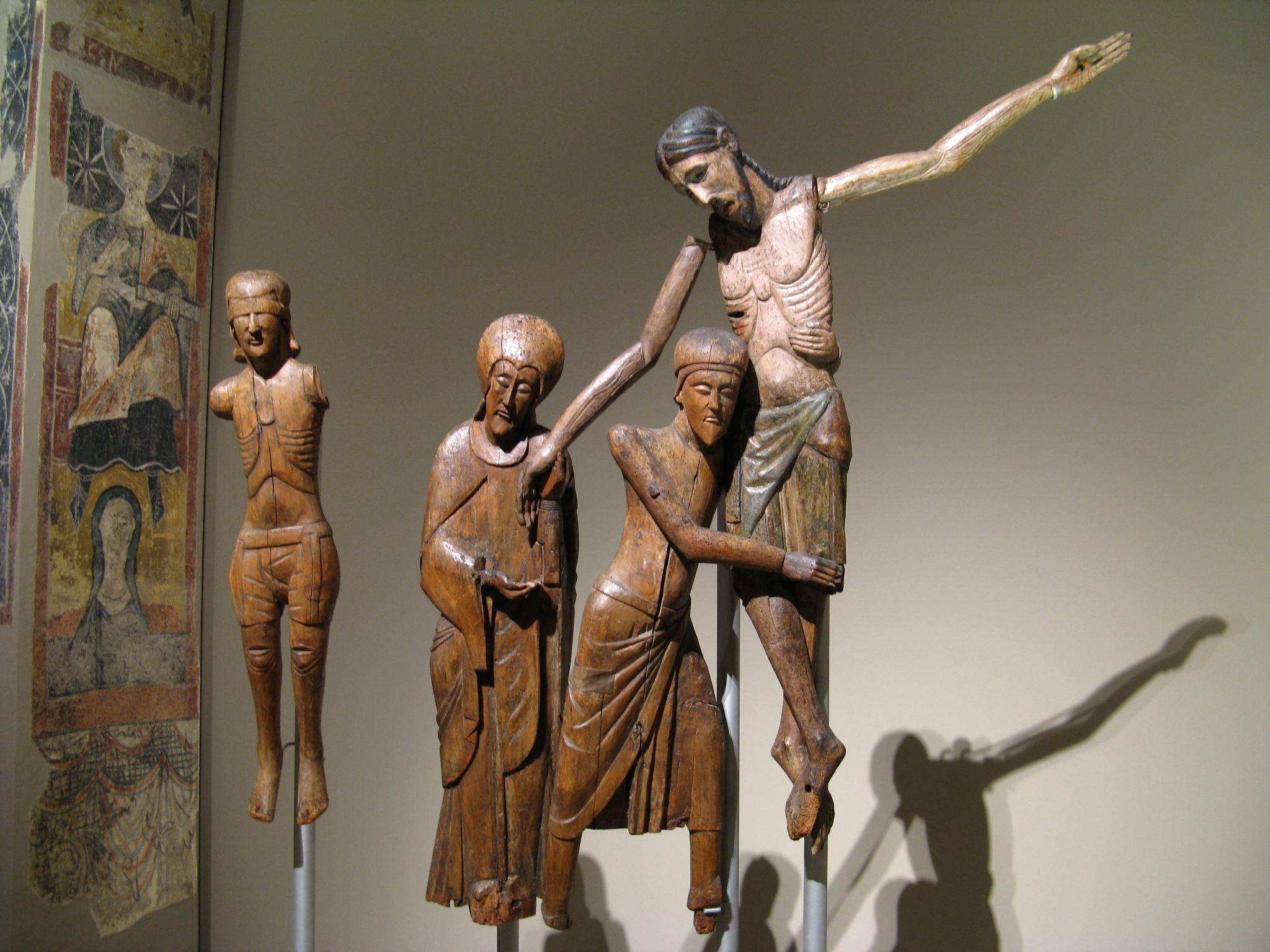 Abnahme Christi vom Kreuz (2. Hälfte 12. Jhdt., Taüll, heute im Katalanischen Natioanlmuseum MNAC in Barcelona)